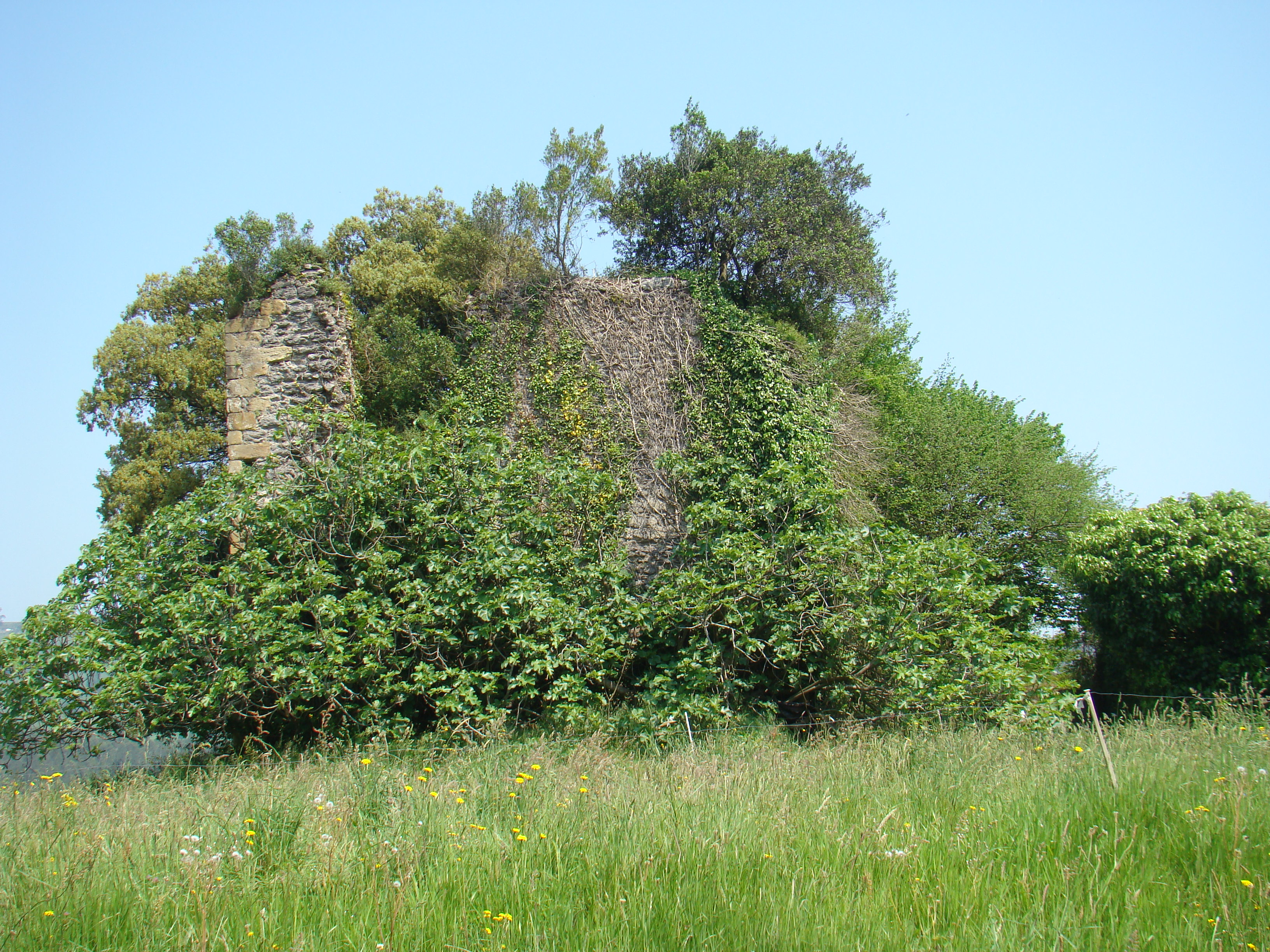 Torre medieval de la familia Alvarado cuyas ruinas se conservan en la localidad española de Secadura, municipio de Voto, Cantabria.